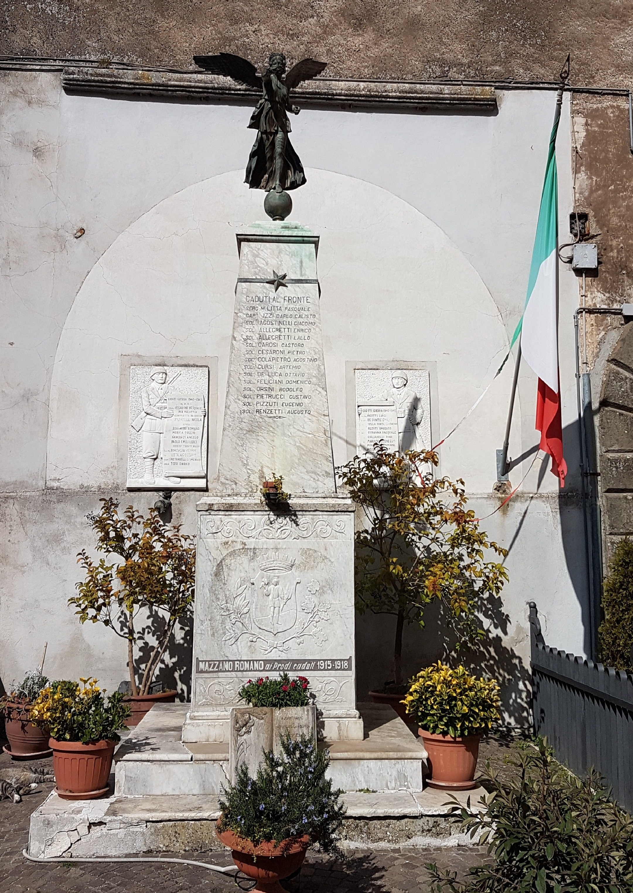 Monumenti ai caduti, Mazzano Romano (RM), Italia World War I and World War II memorials in Mazzano Romano, Italy